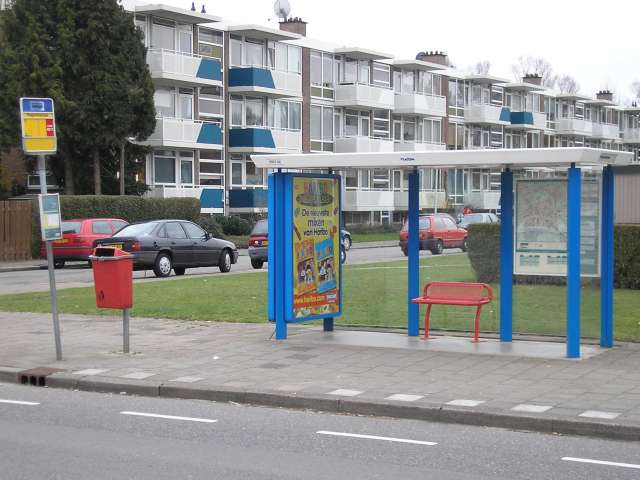 Bushalte met abri, bankje, prullenbak, reclame en stadskaart.